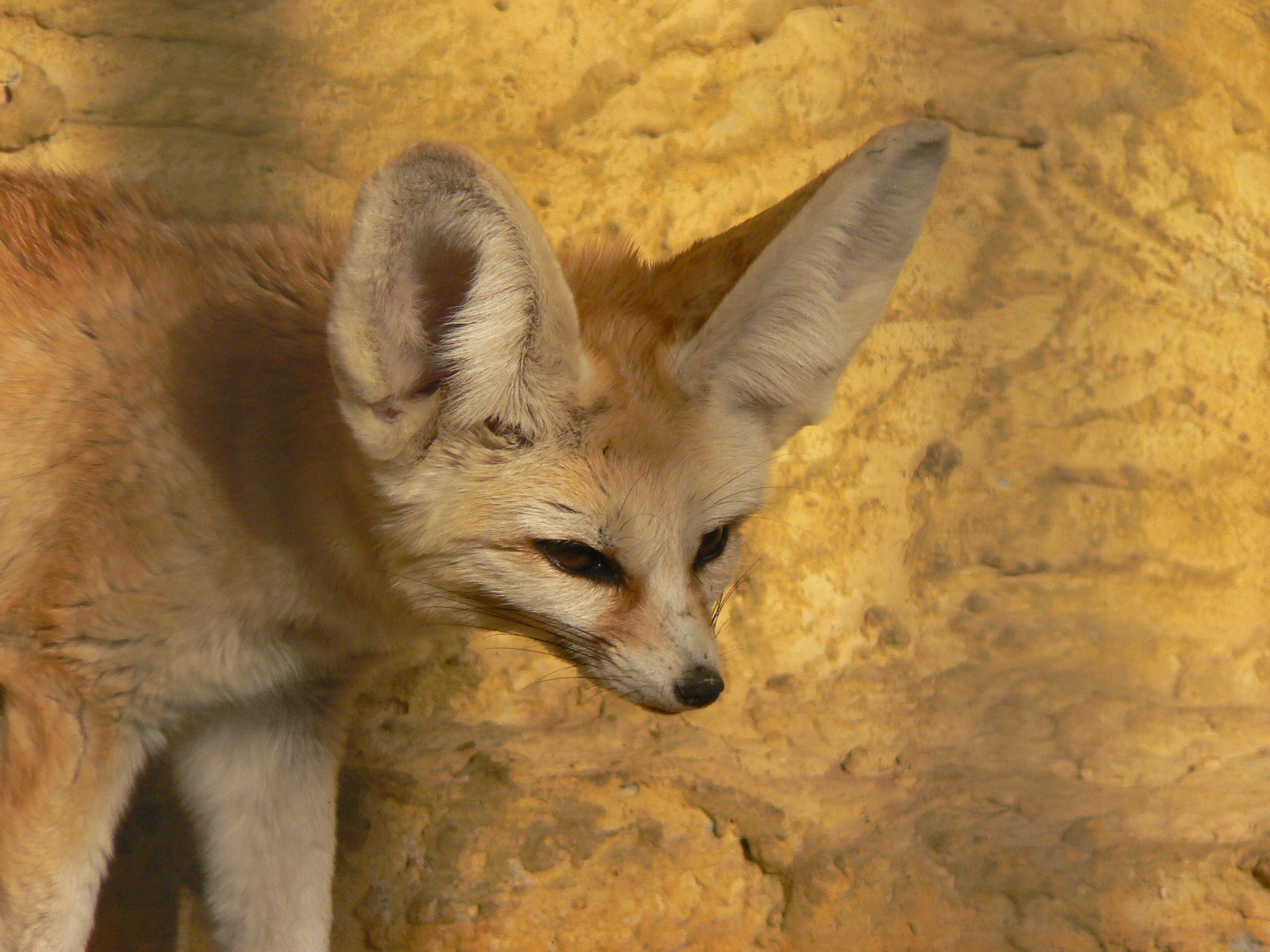 צולם בגן הזואולוגי בת"א Taken in Tel Aviv Zoological Gardens Fenec פנק